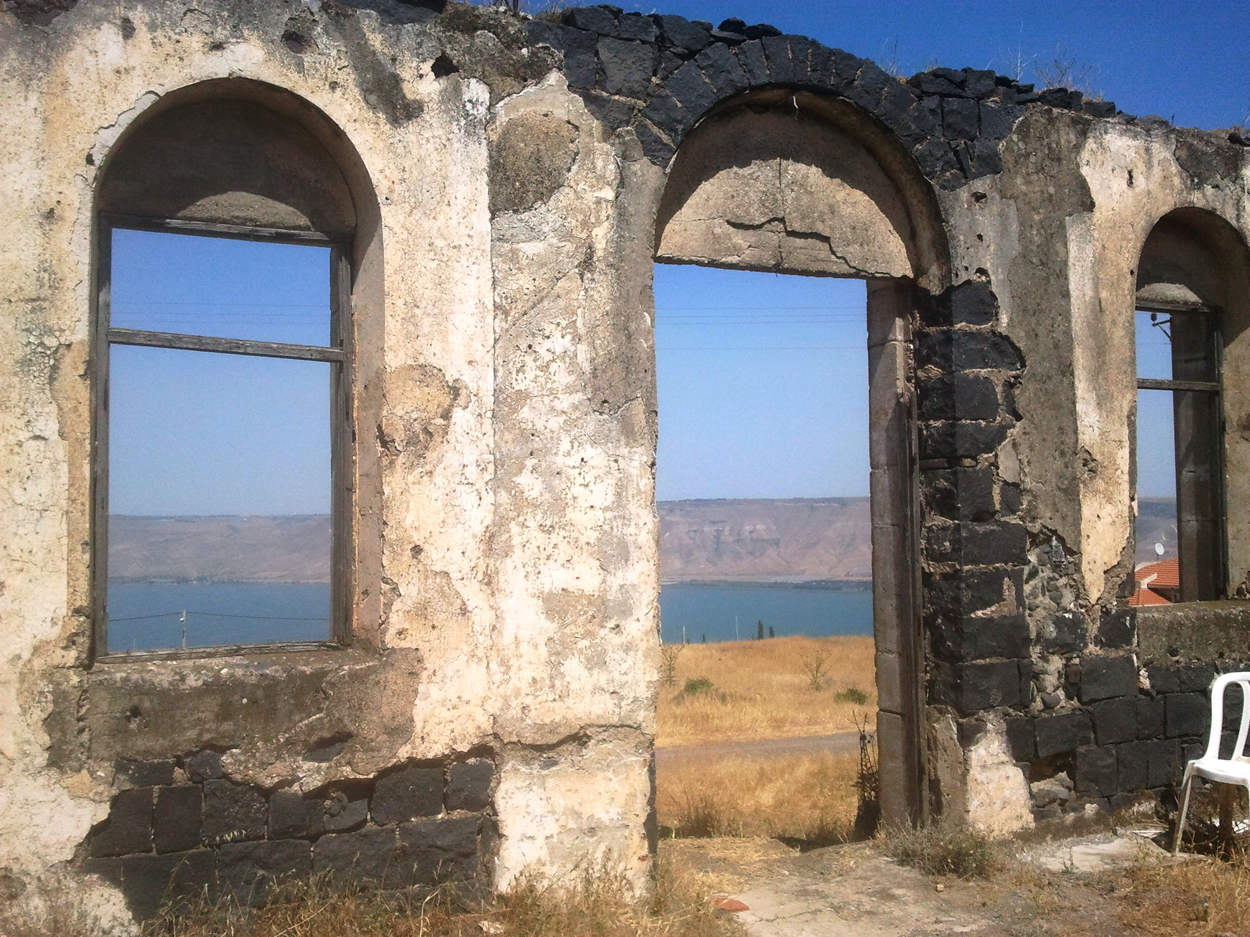 אחוזת פוריה (חוות פוריה) הייתה התיישבות שהוקמה בשנת 1910 ברכס פוריה על ידי חברת אחוזת סנט לואיס. מבני האחוזה השוכנים ביישוב פוריה עילית, הוכרזו כאתר מורשת בישראל. תצפית לכנרת מתוך אחד המבנים